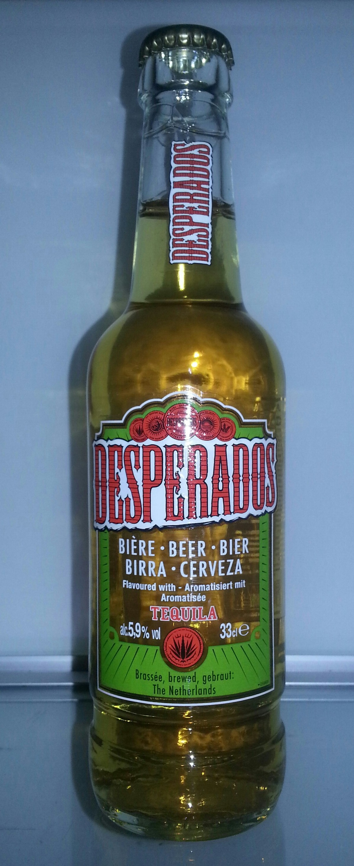 Eine Flasche Desperados - neues Etikett mit Angabe des Brauortes Niederlande